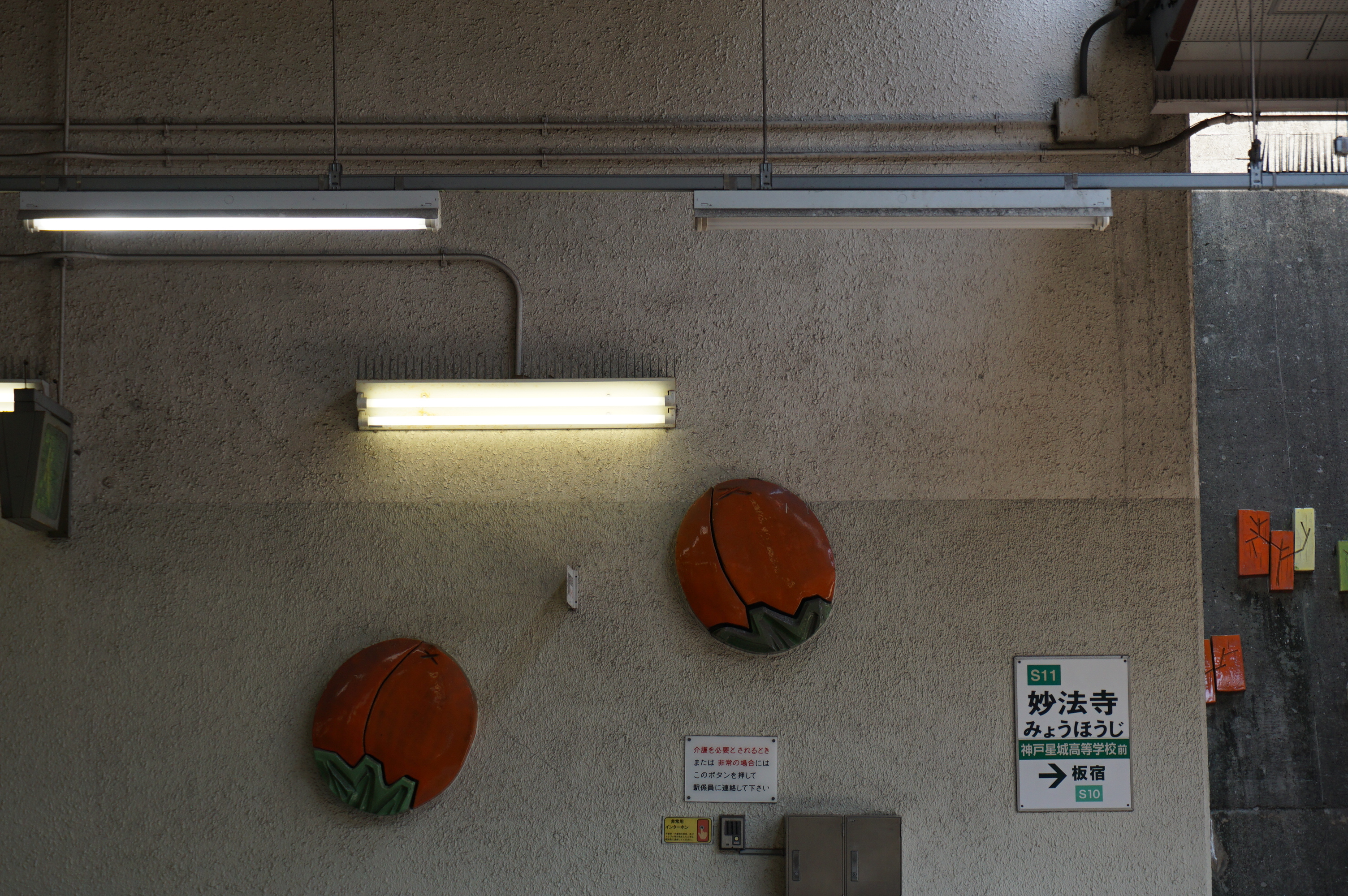 ホーム壁に埋め込まれている柿のレリーフ